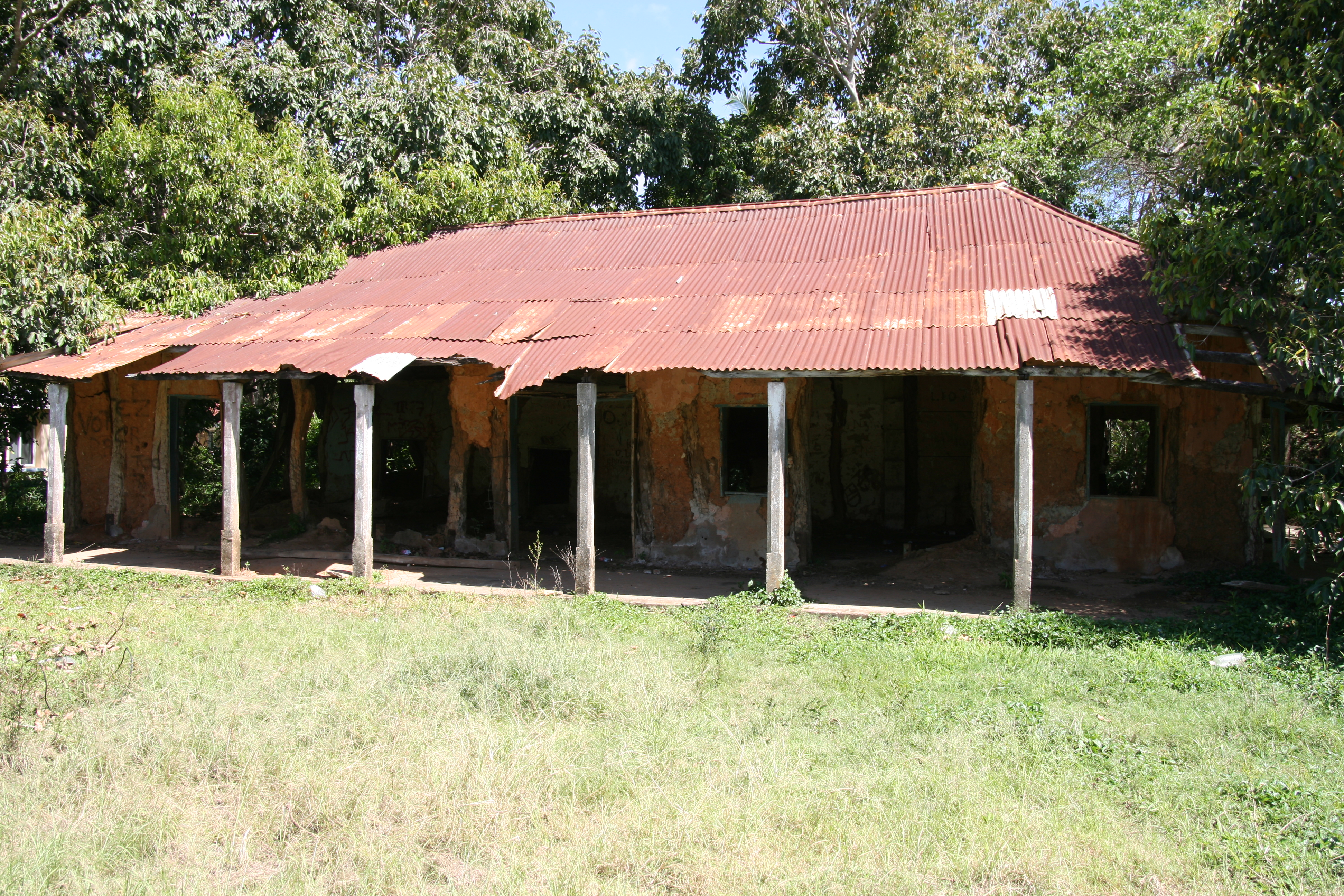 Le Commissariat de l'Or au Caillou, devenu l'hôtel Normandon en 1896.